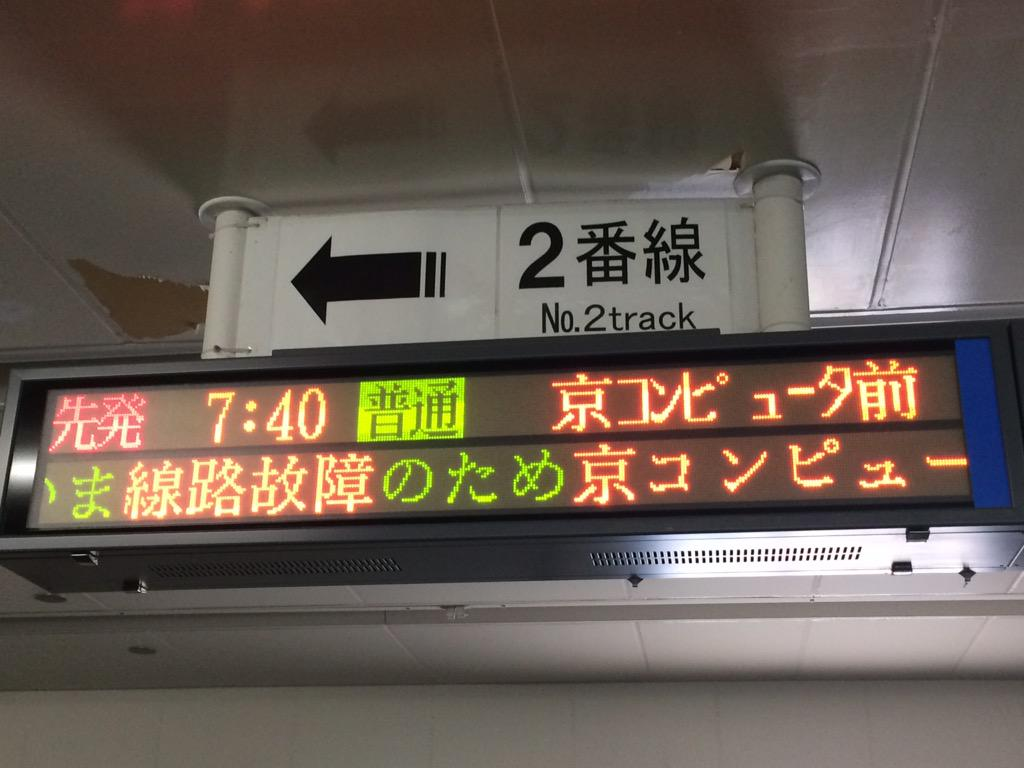 異常発生時に京コンピュータ前どまりになった際の三宮駅案内掲示板